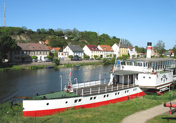 Oderberg, Raddampfer und Häuser am Oder-Havel-Kanal. 52°51′51.3″N 14°2′45.4″E / 52.86425°N 14.045944°E